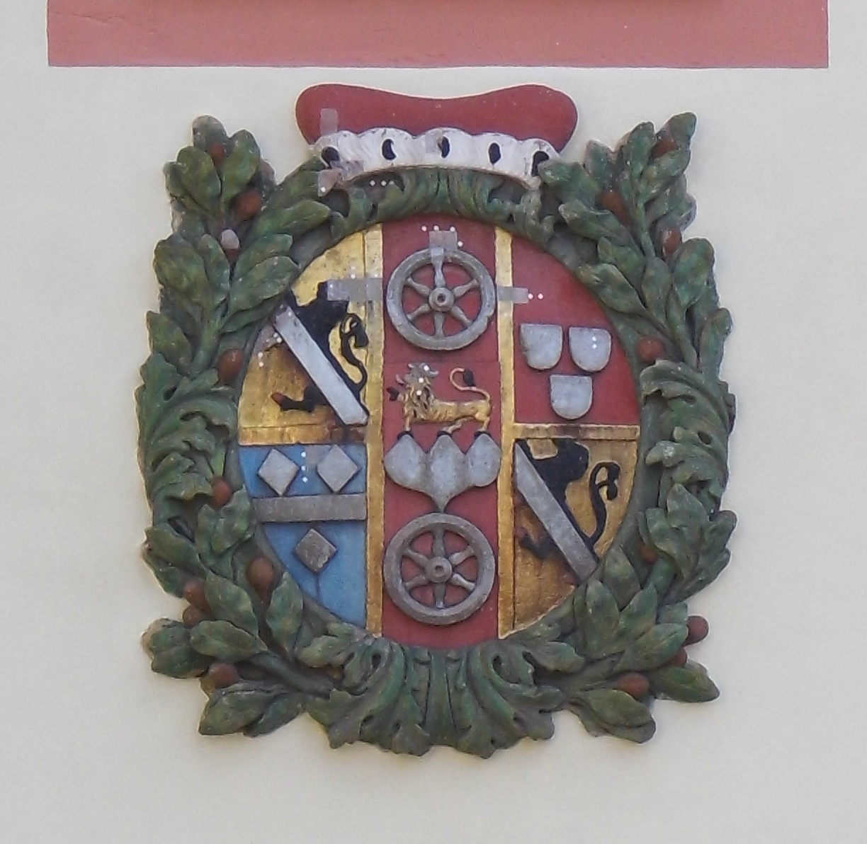 Hofheim, Kellereigebäude, Wappen über der Tür